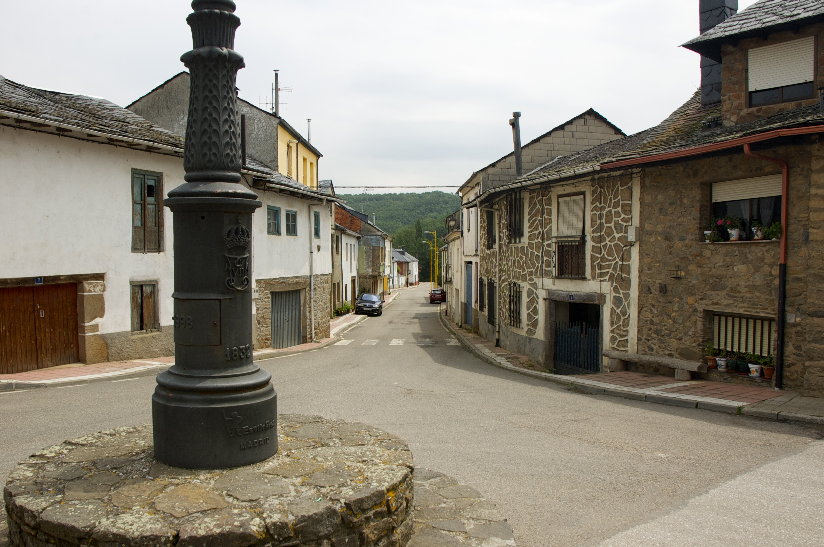 Noceda del Bierzo, municipio de León, España.